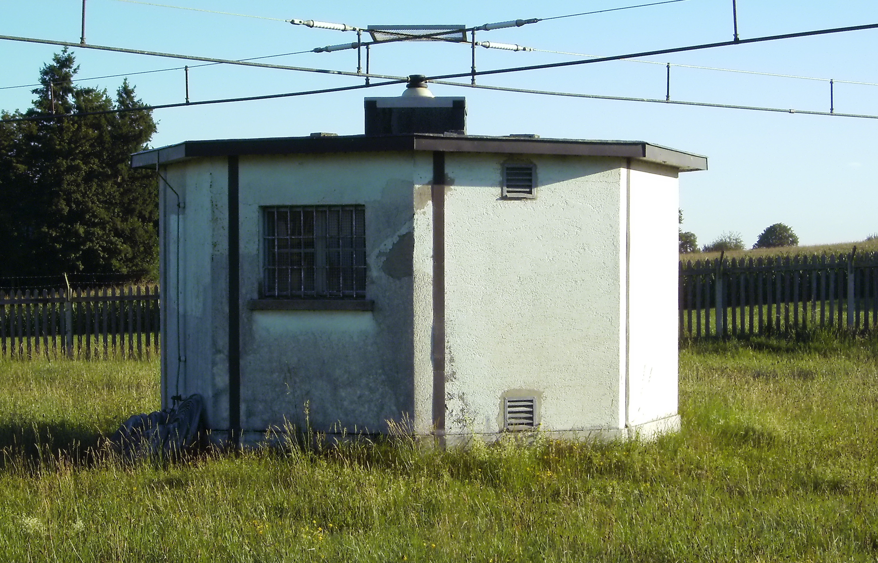 Abstimmhaus Reservesendeturm Beromünster